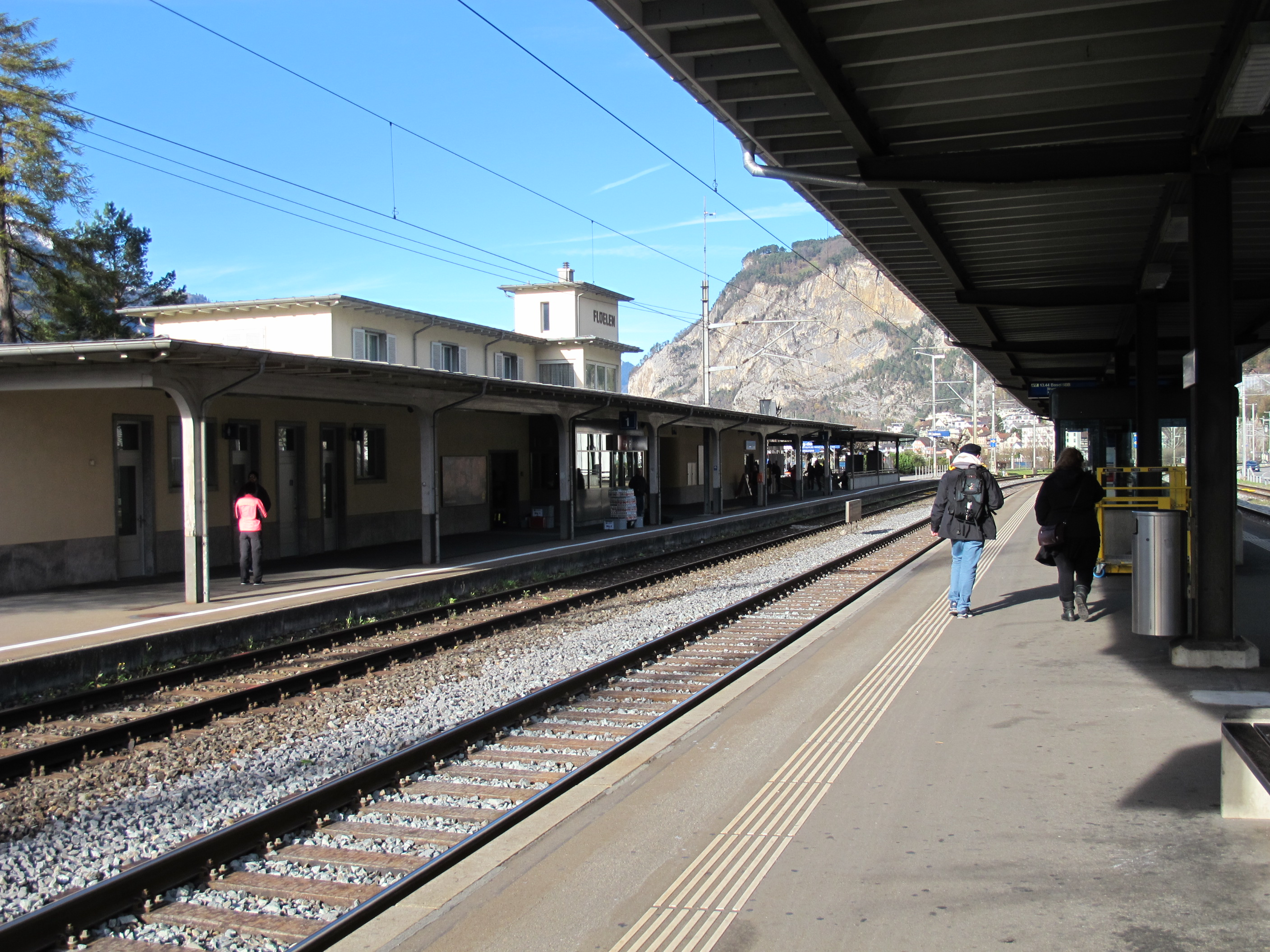 Bahnhofsgebäude in Flüelen, von Gleis 2